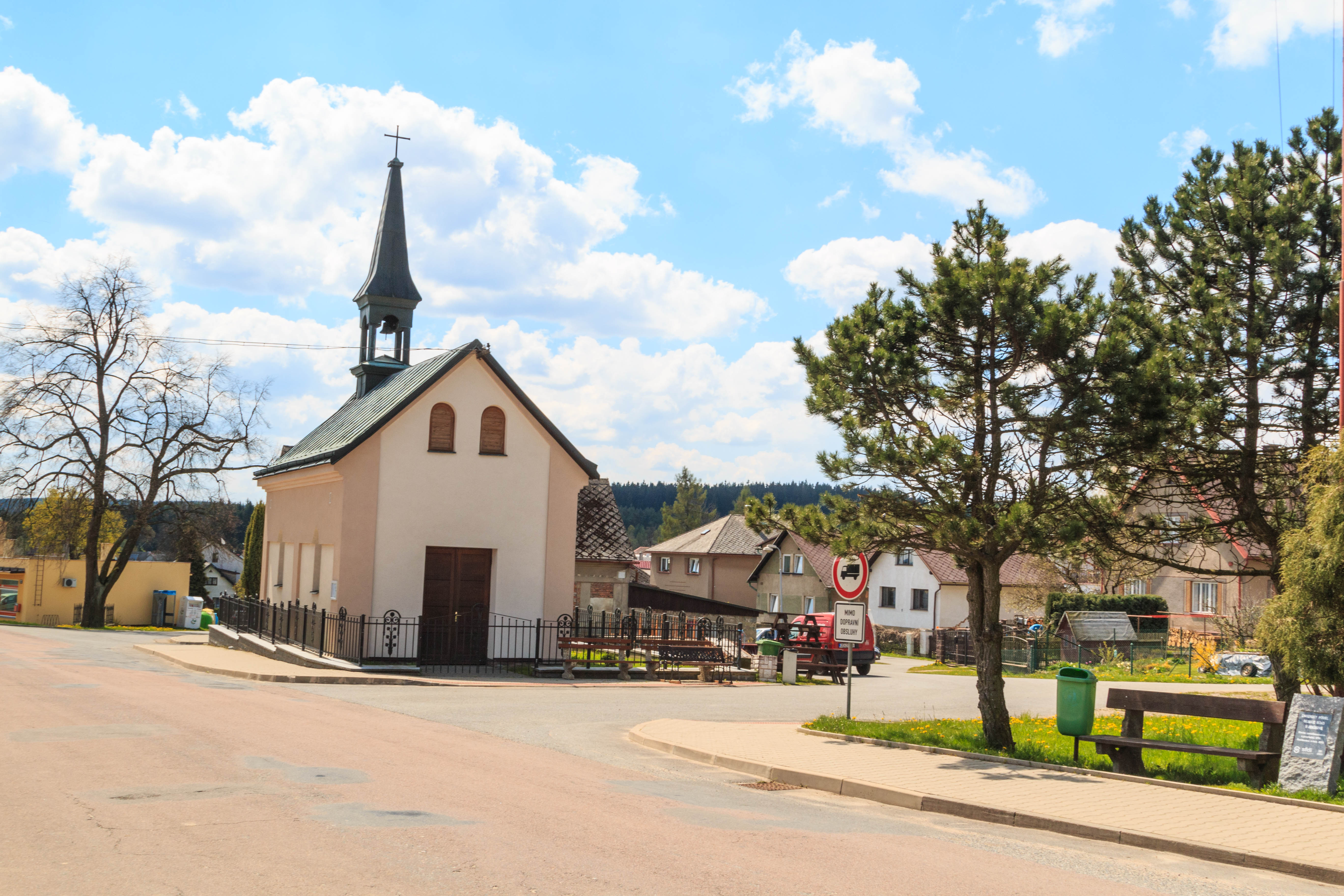 Jeníkov kaple